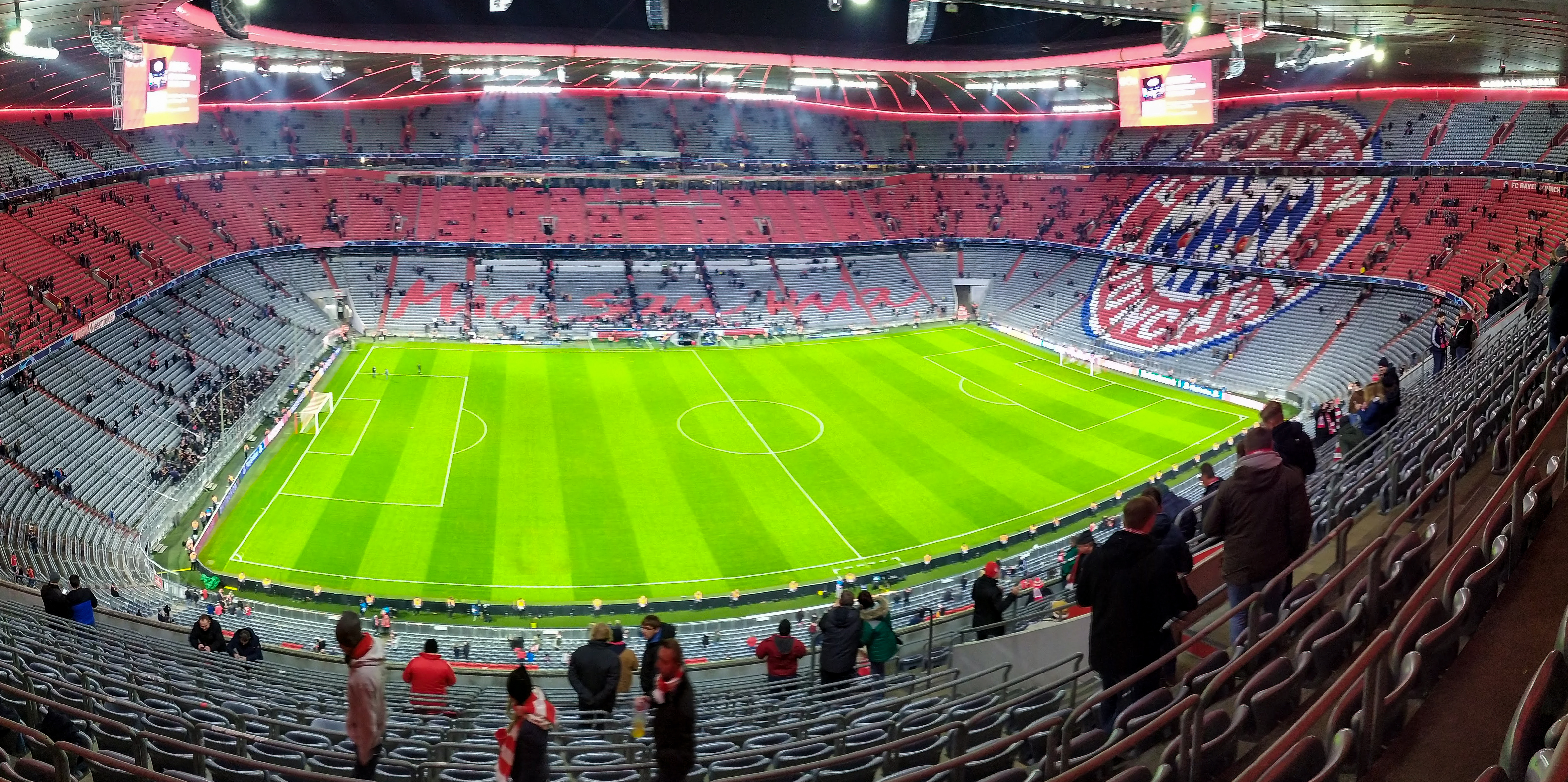 Innenansicht der Allianz Arena von der Osttribüne